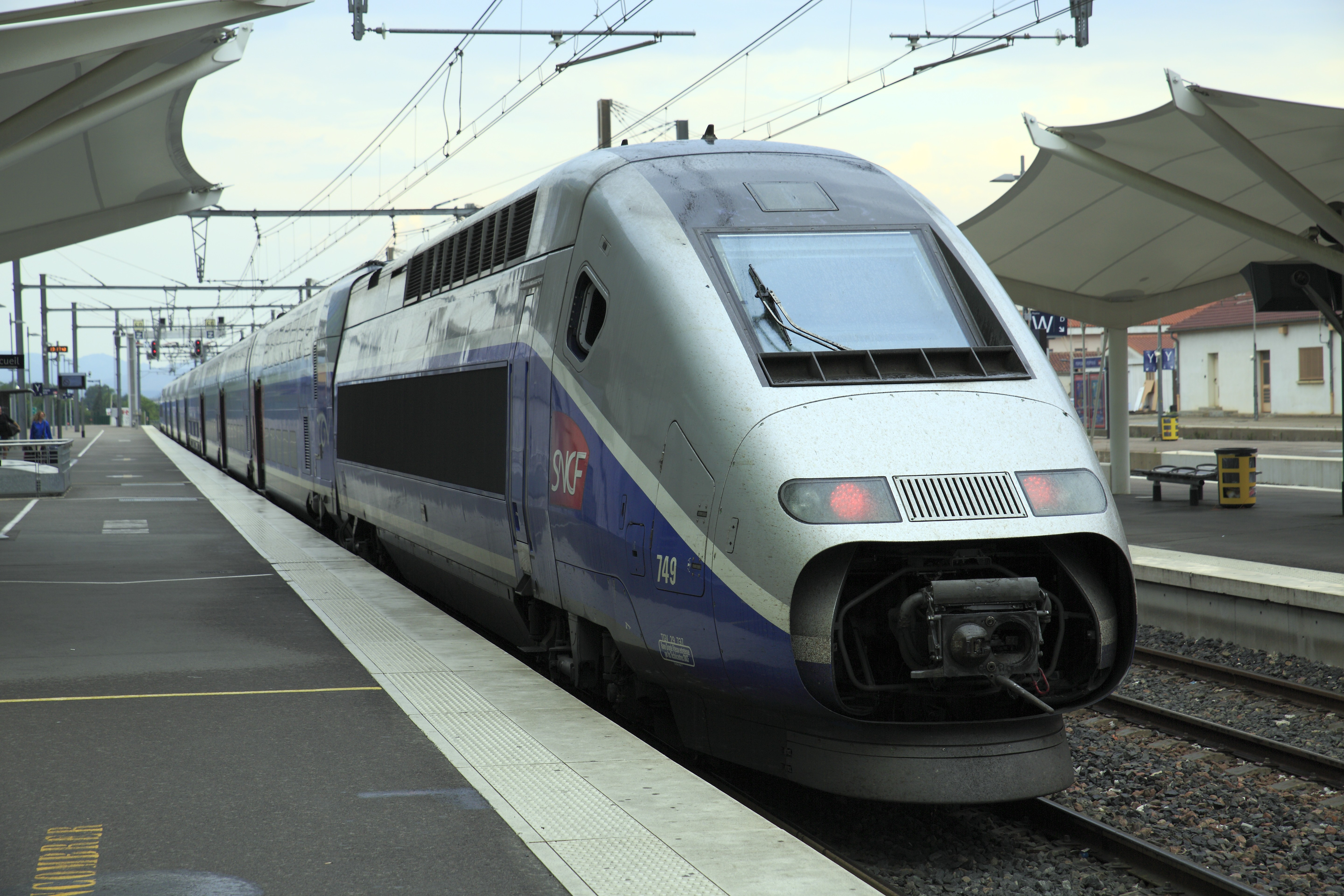 TGV Duplex Paris–Barcelona, die zweite Zugeinheit endet in Perpignan. Sie bleibt am Bahnsteig stehen, während die erste in Richtung Figueras weiterfährt. Die Kupplungsabdeckklappen sind noch geöffnet.Die Maschinen werden auch mit einstöckigen Wagenzügen eingesetzt, zur Konturanpassung sind die Doppelstockendwagen an den Enden oben etwas eingezogen.